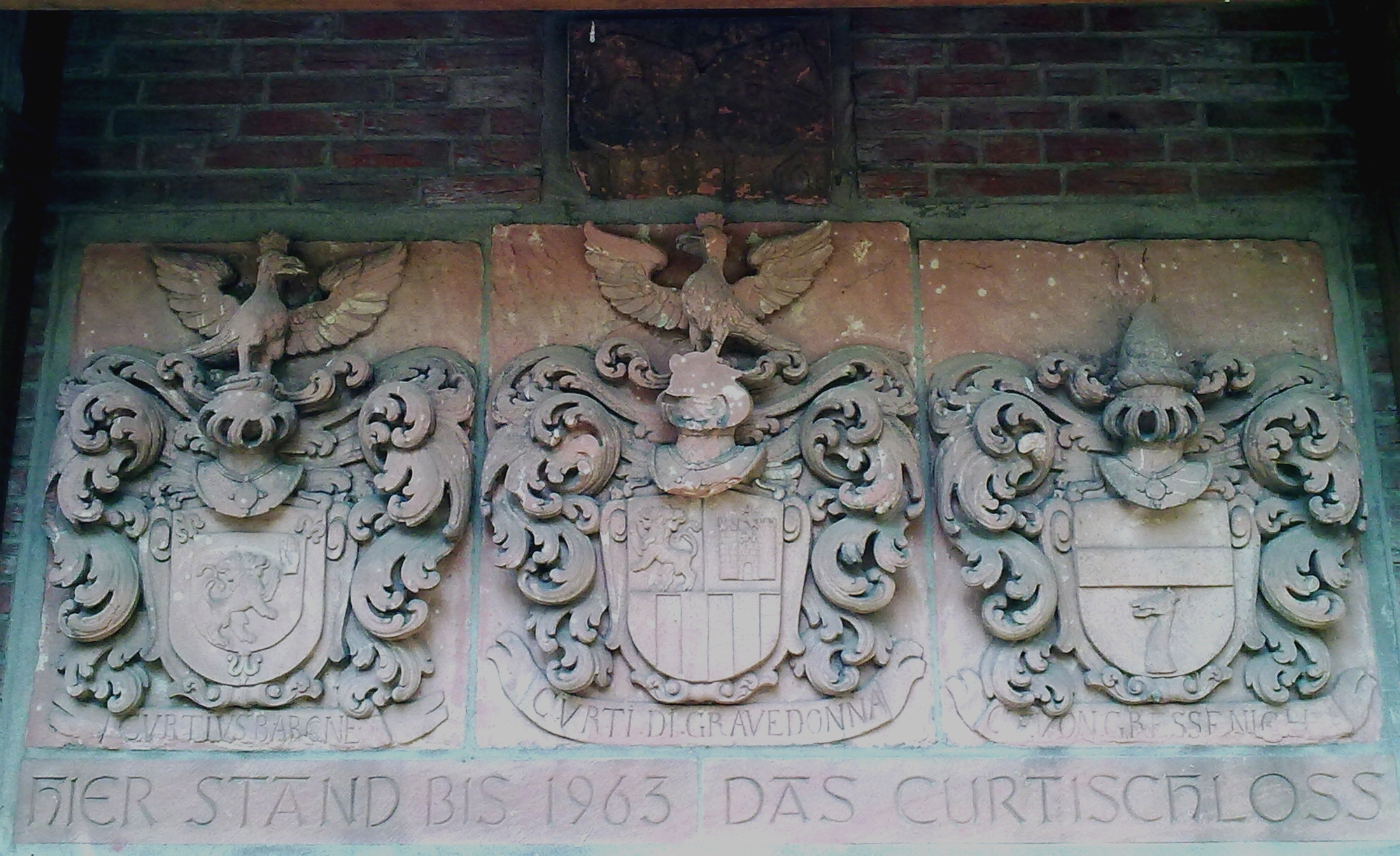 Die Reste des Curti-Schlosses, die drei Wappen: links "Curtius Baronet", mittig: "Curti di Gravedonna", rechts: "C. F. von Gressenich", die bis 1963 über dem Toreingang angebracht waren. Darüber, schwer sichtbar das Doppelwappen der Vorbesitzer: Hartlieb genannt Walsporn und Bonne mit der Jahreszahl 1516